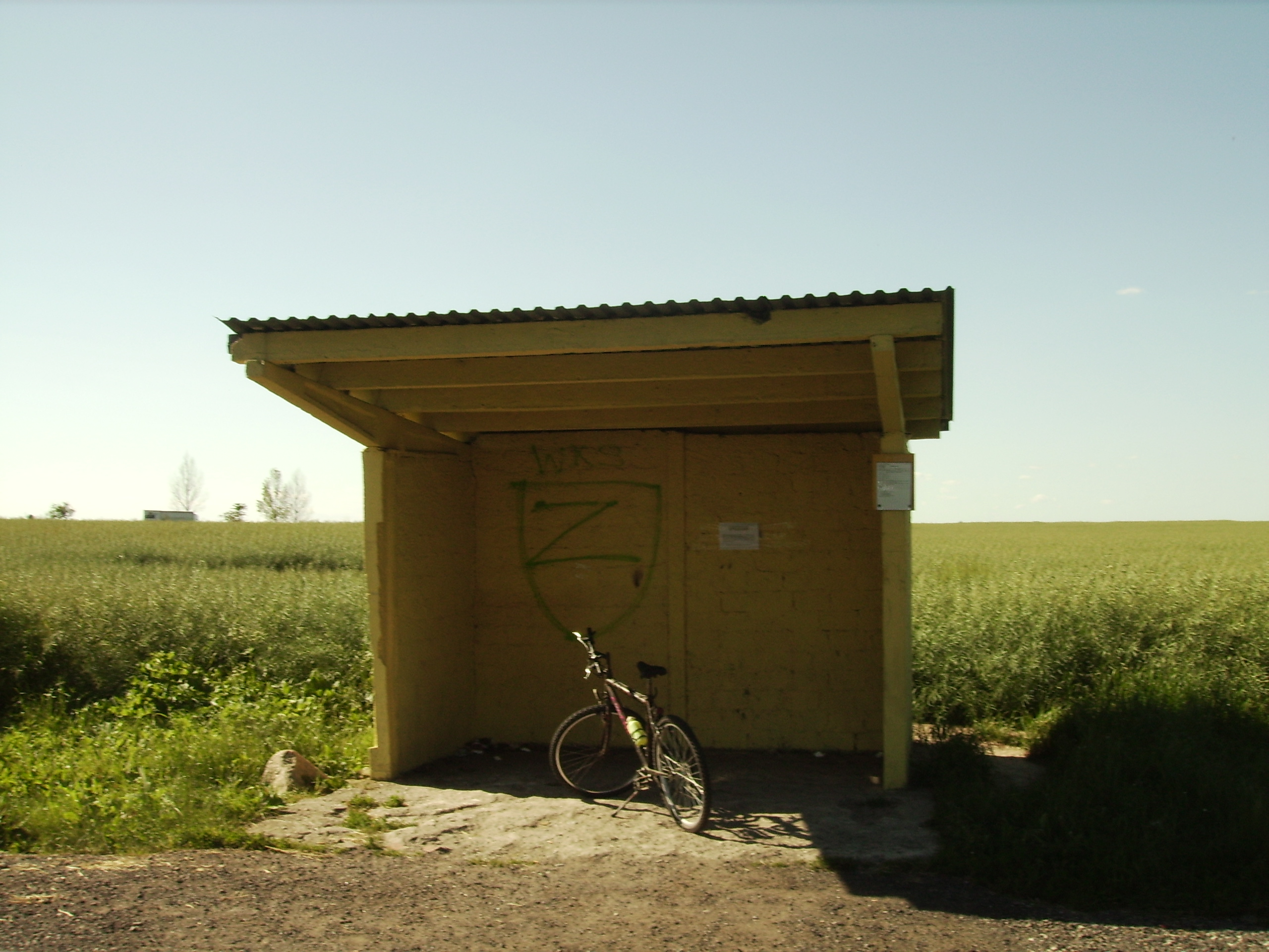 Przystanek w Zegartowicach